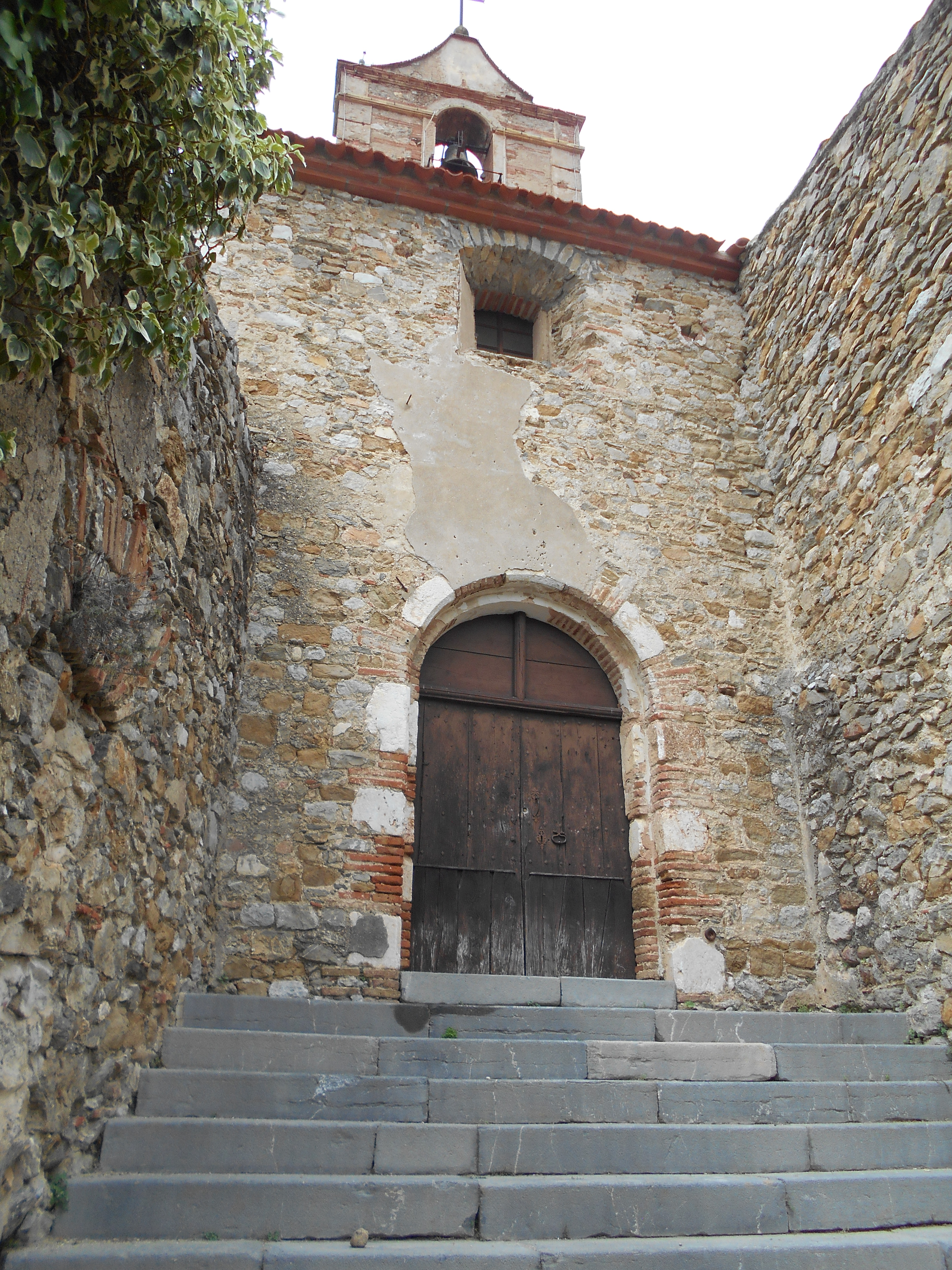 Porta meridional de l'església